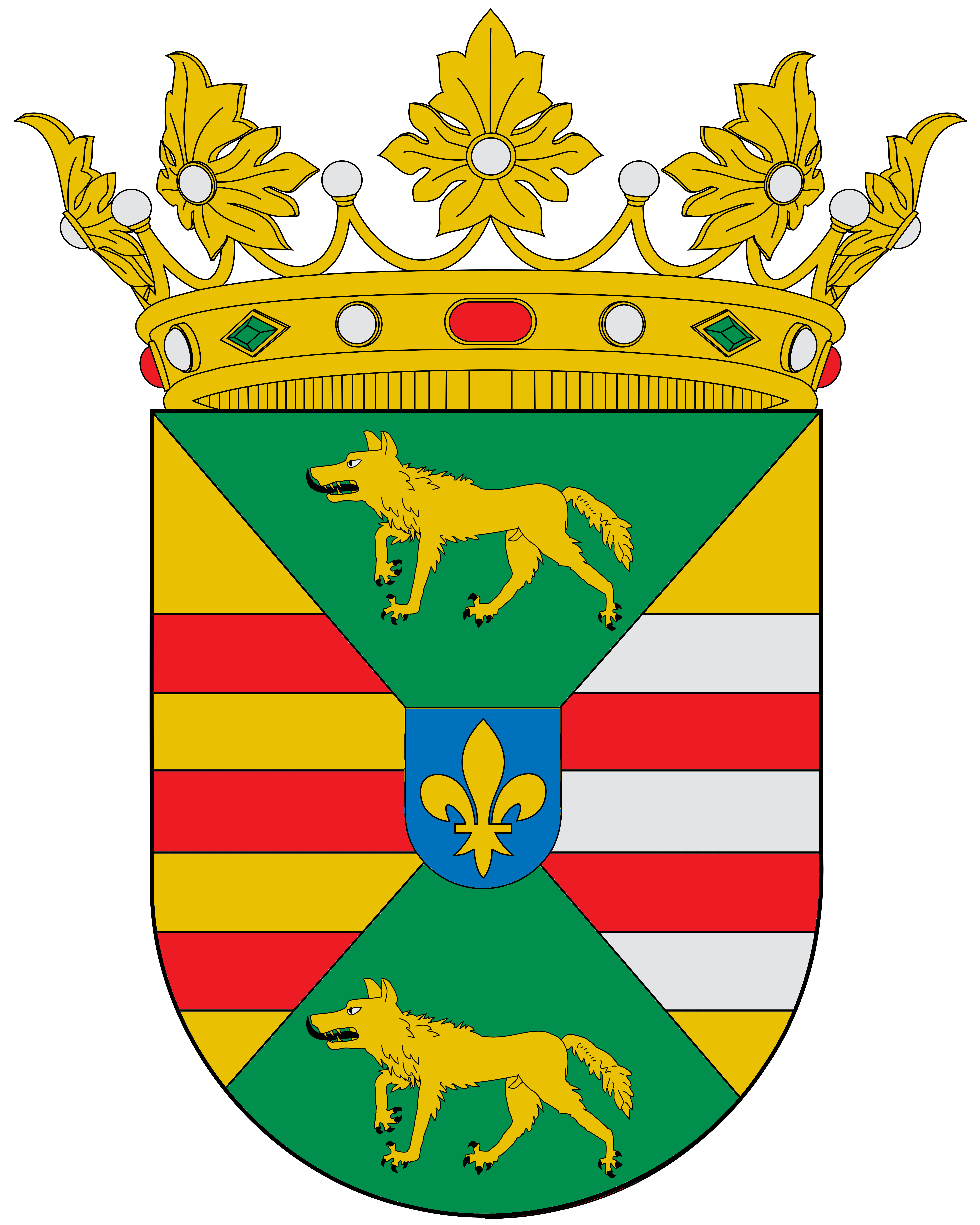 Escudo de Canfranc